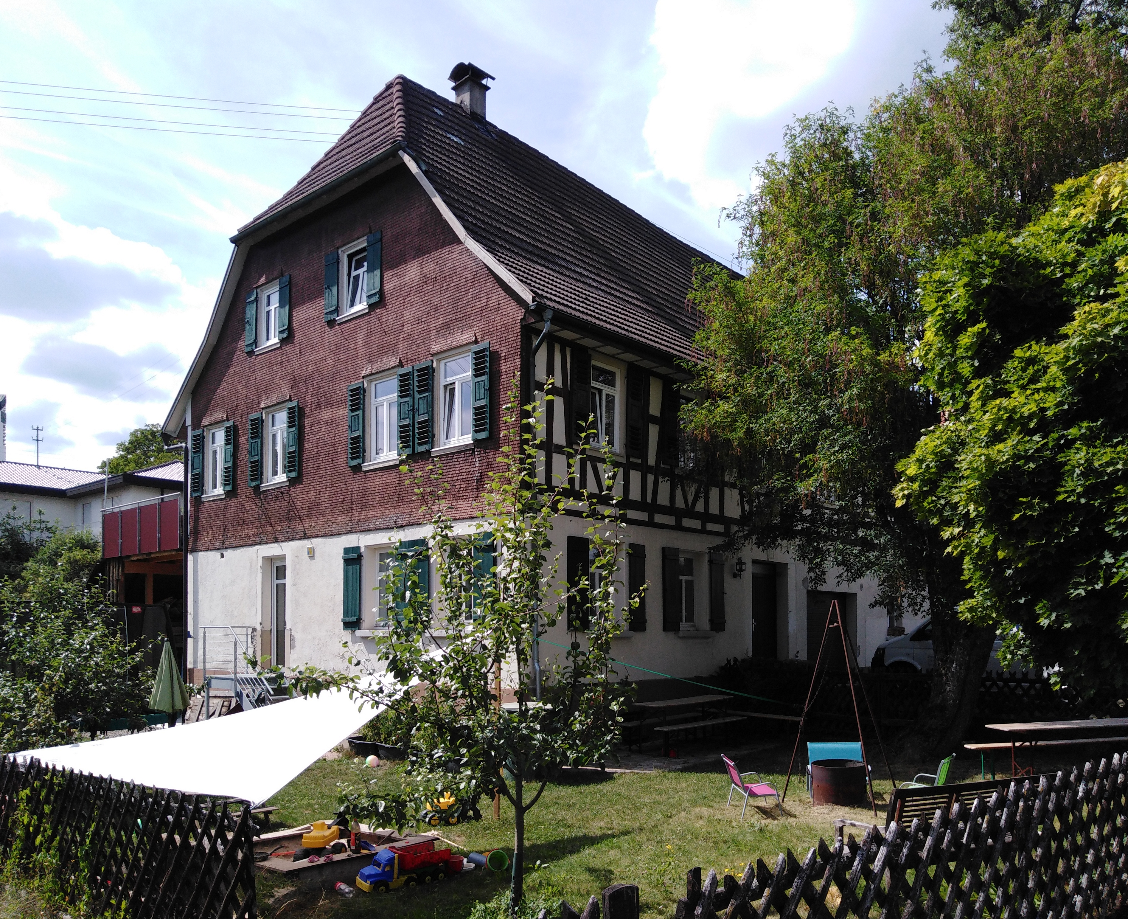 Marschalkenzimmern (Stadt Dornhan) Wohnhaus Friedrich August Köhler, Brunnenstr. 15